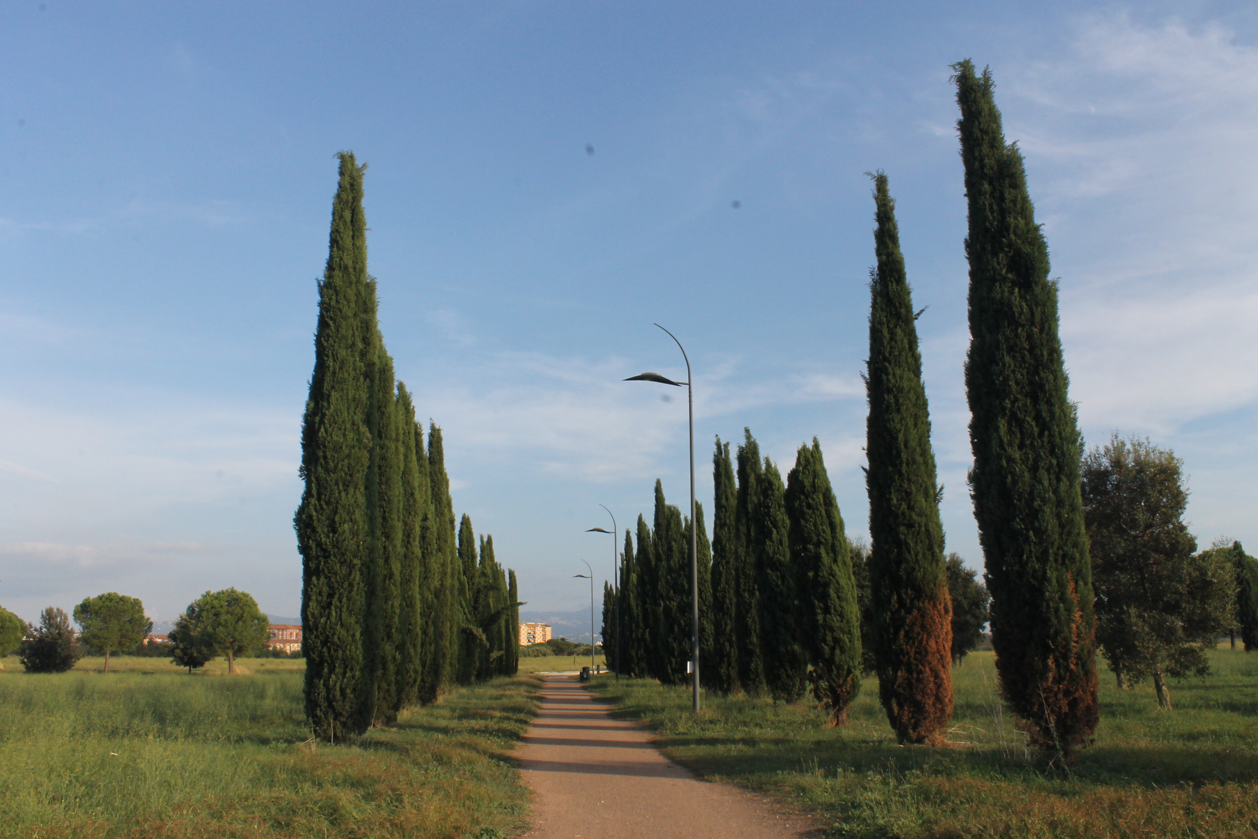 Parco archeologico di Centocelle This is a photo of a monument which is part of cultural heritage of Italy.